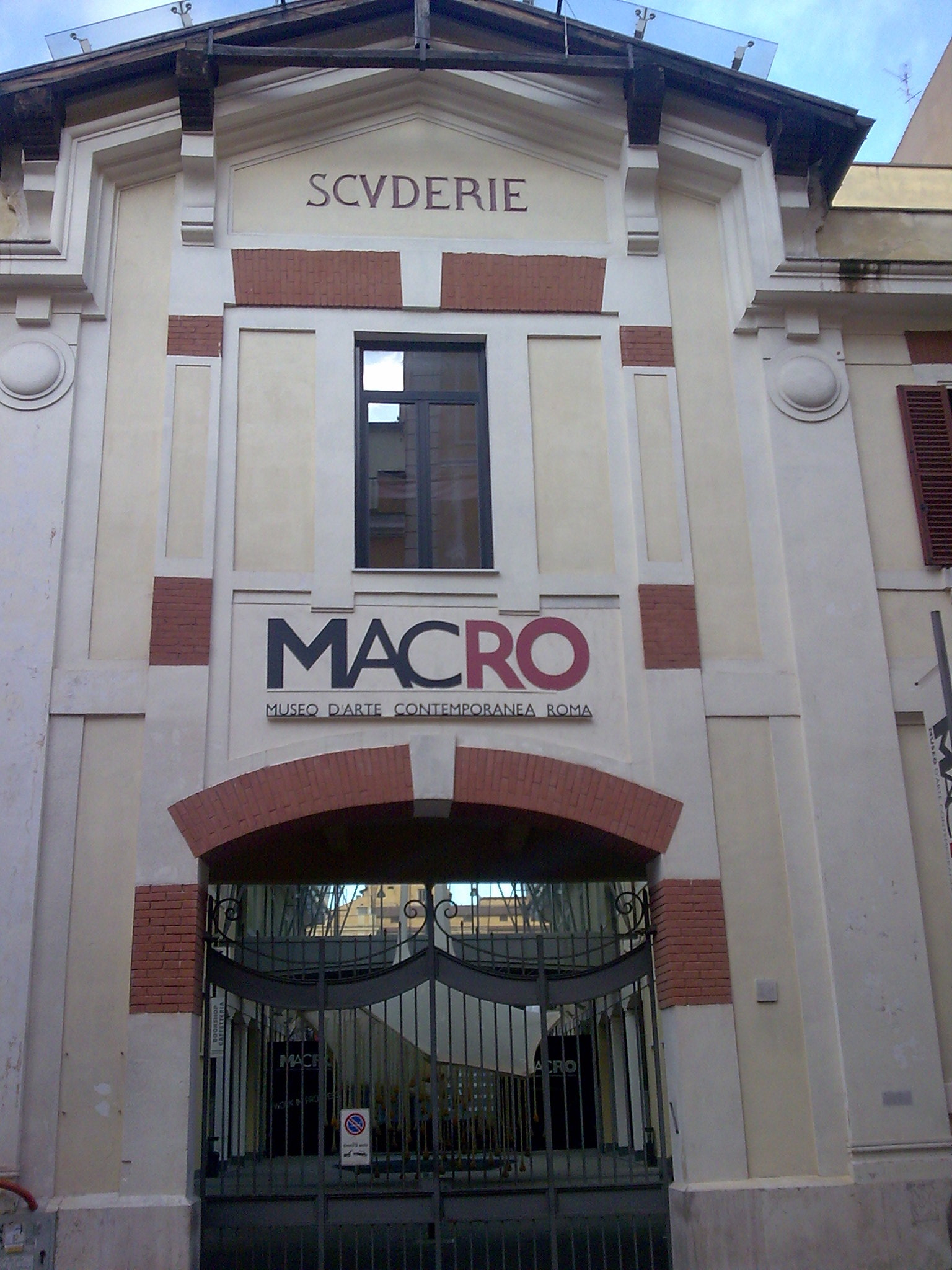 Musée d'art contemporain de Rome (MACRo)